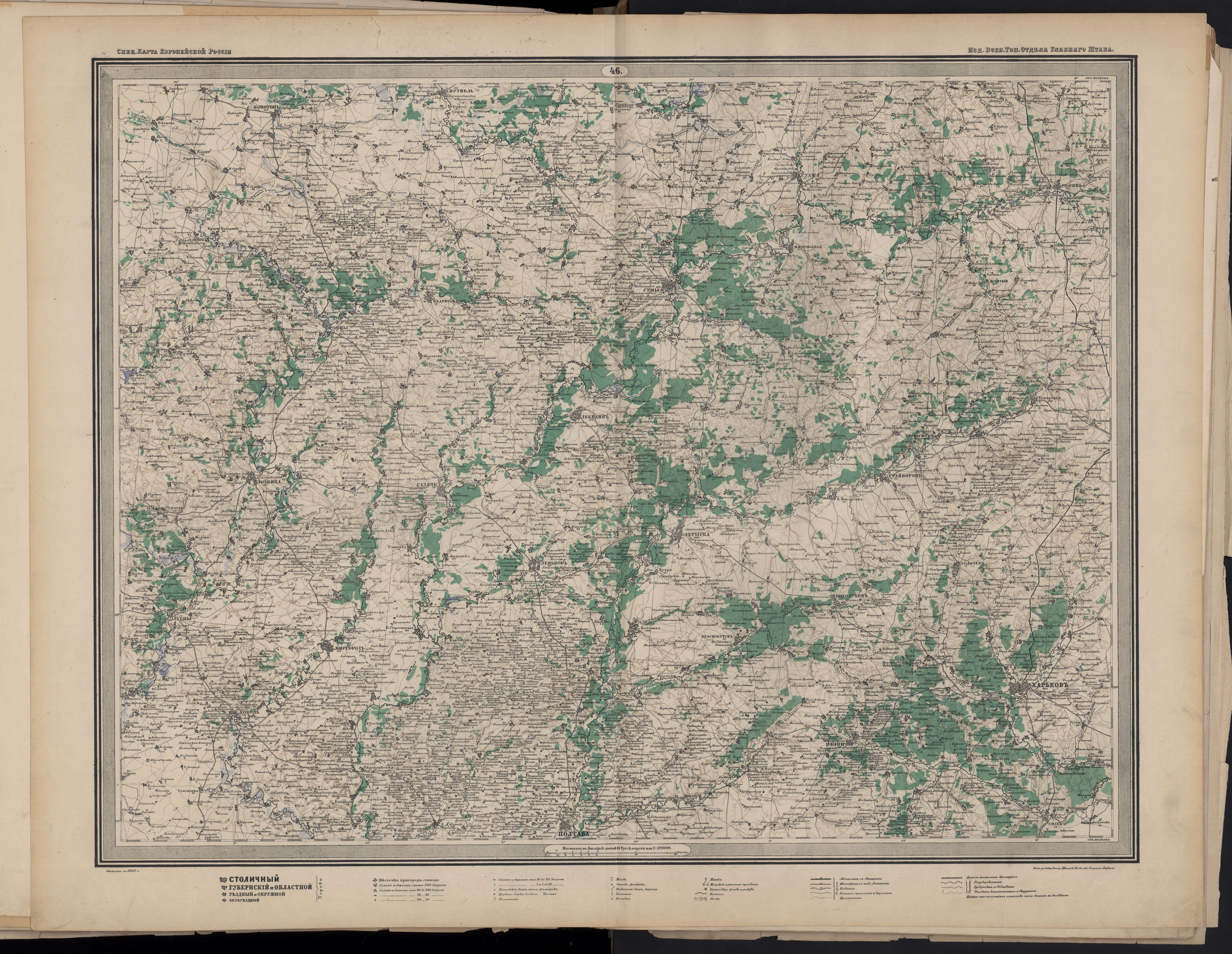 Специальная военная карта Европейской части России. 1868 год.